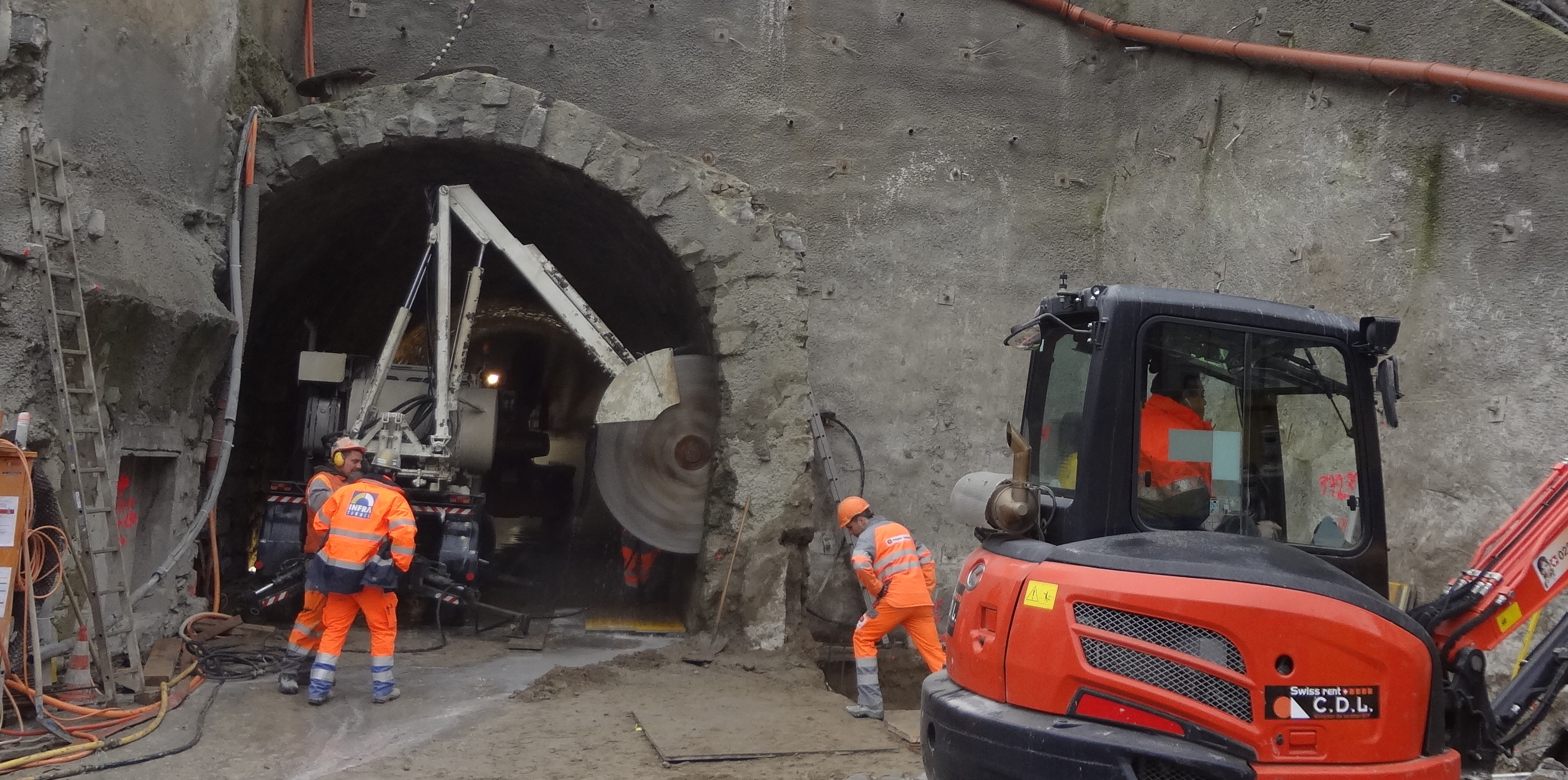 Tunnel piétonnier reliant l'hôpital principal des Hôpitaux universitaires de Genève et le quartier Cluse-Roseraie à la nouvelle station de train de Champel (dans le cadre de l'extension du réseau « CEVA »). Entrée à l'avenue de Beau-Séjour. La voûte est la structure d'une ancienne cave, attestée au début du XXe siècle, utilisée comme cave à fromage jusque dans les années 1950. Opération d'ajustement de l'ancienne structure avec une scie circulaire à pierres.